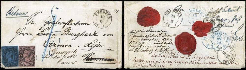 Ein Brief an Burghard von Cramm aus Dresden aus dem Ende des 19. Jahrhunderts.